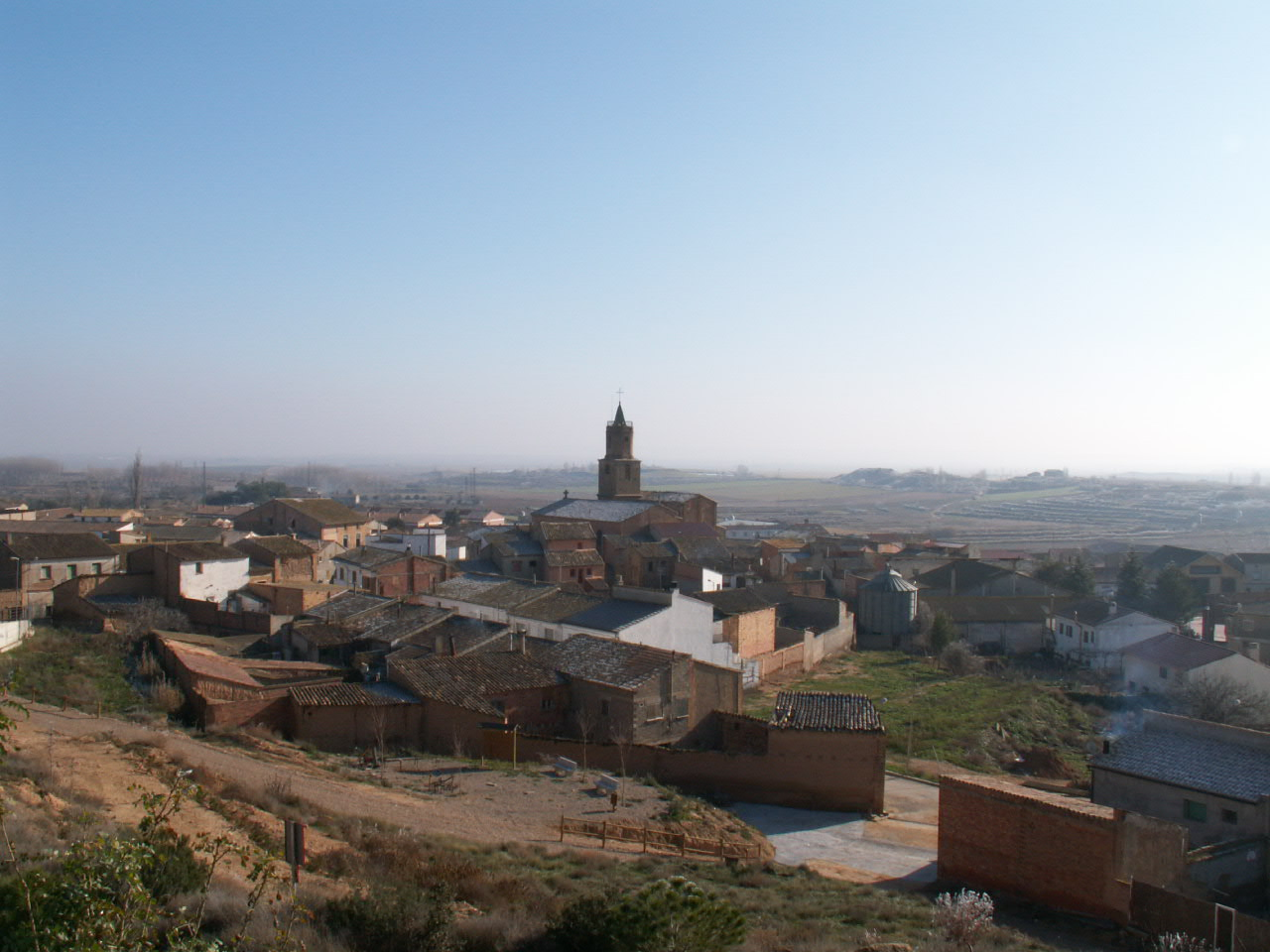 Vista de Esplús, Huesca, España